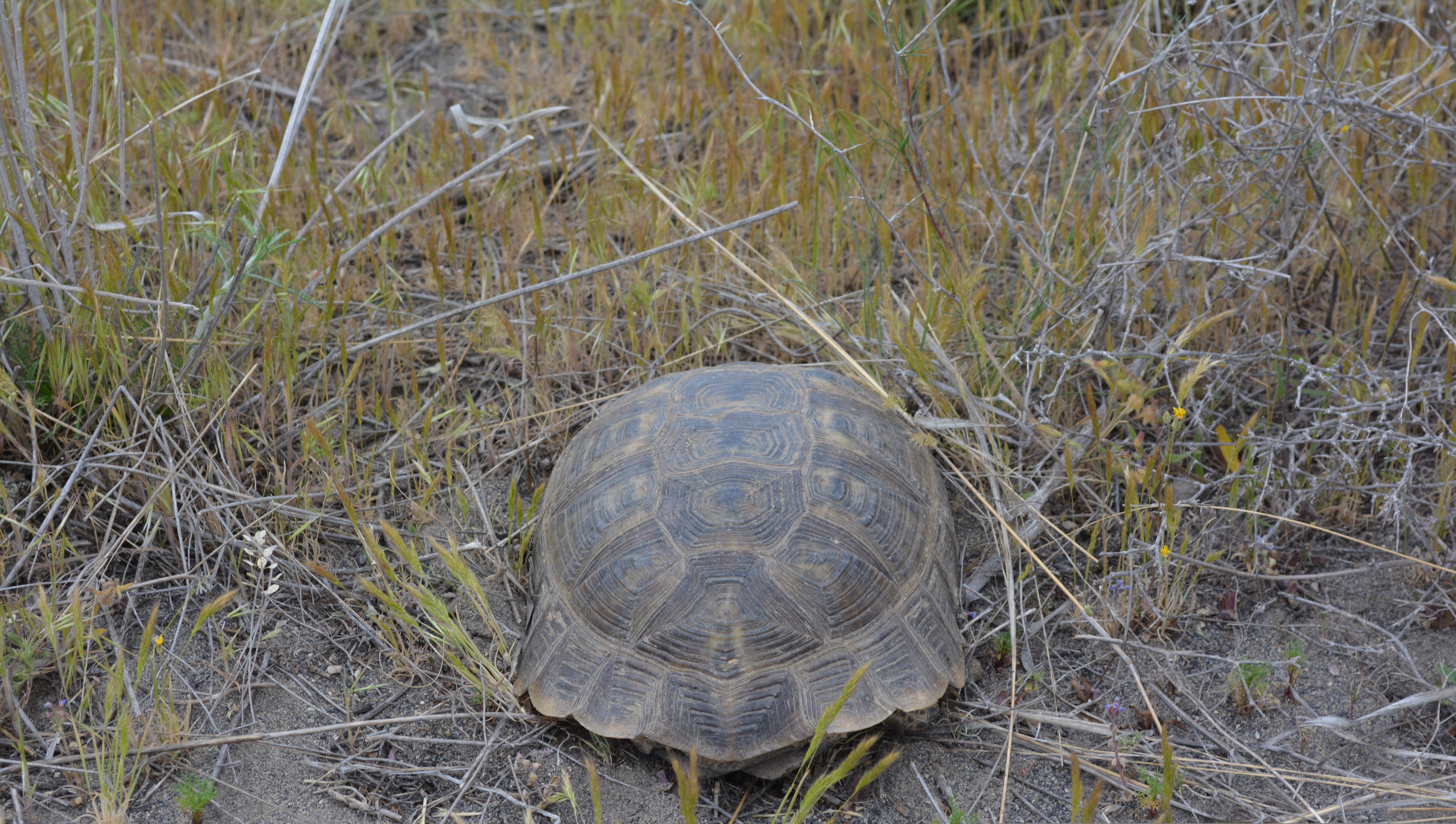 Գոռավանի ավազուտներ